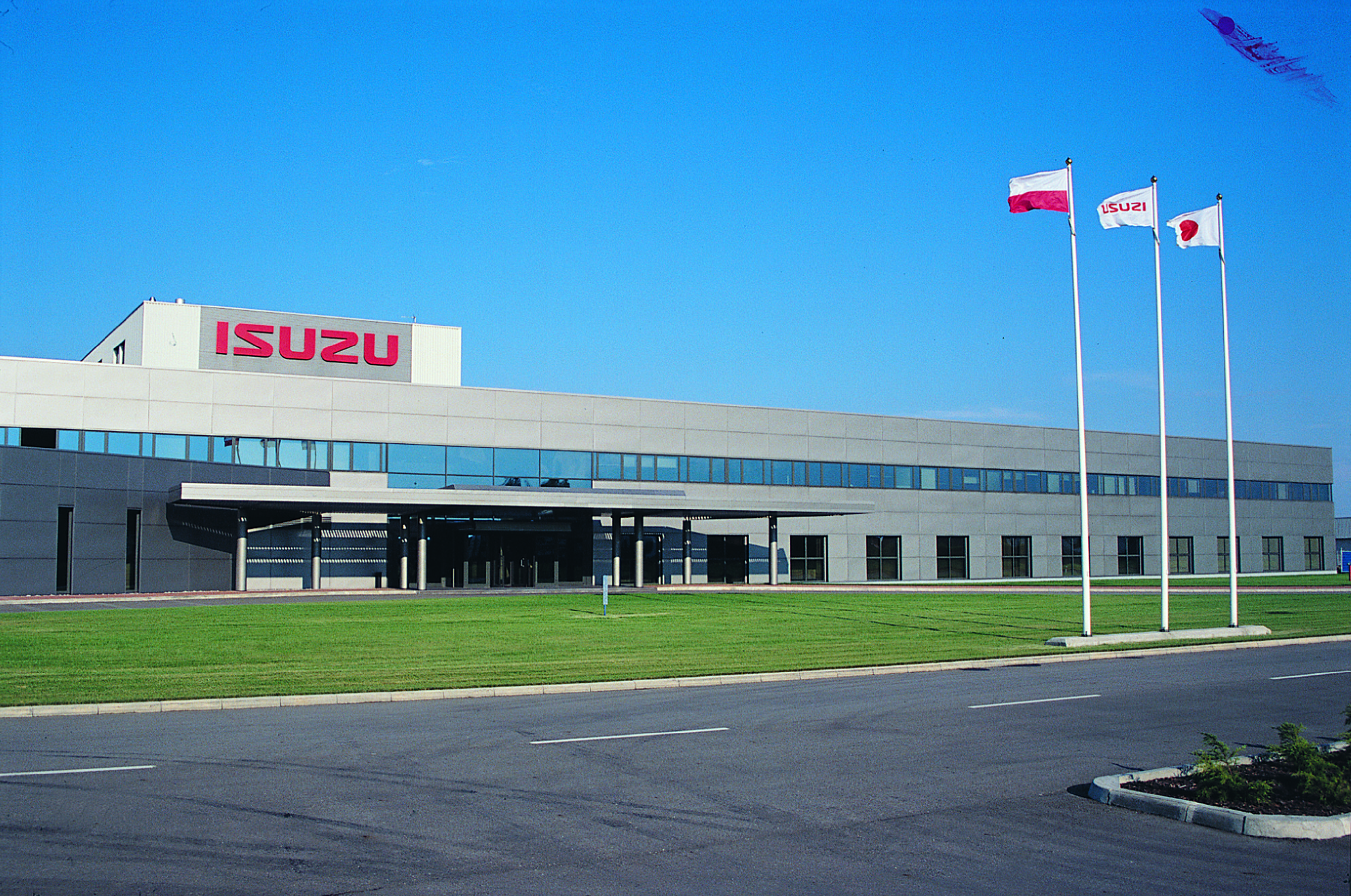 Katowicka Specjalna Strefa Ekonomiczna - ISUZU foto. tyski art. fotograf.